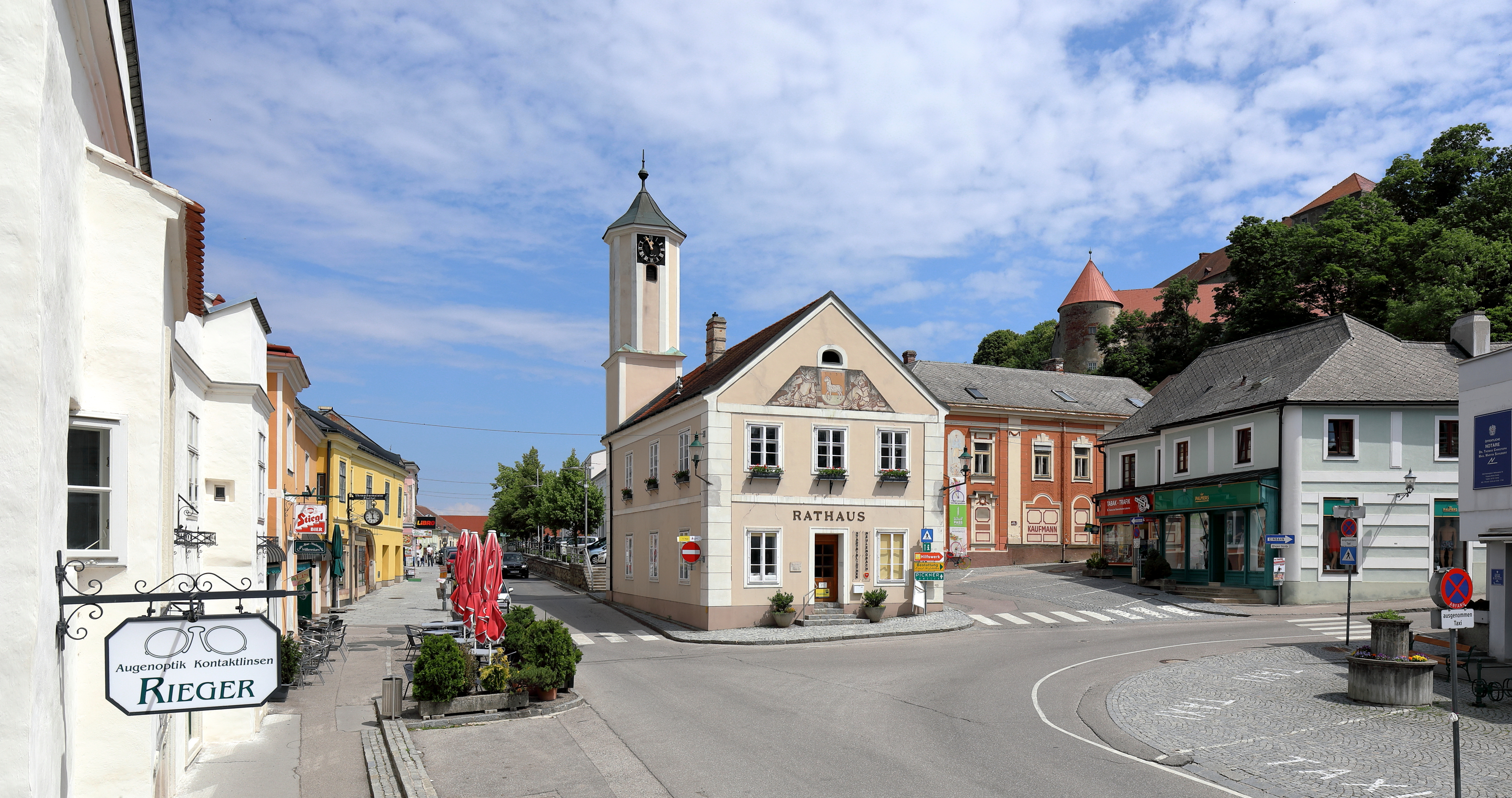 Das Ortszentrum der niederösterreichischen Stadtgemeinde Neulengbach. Ganz links teilweise das spätgotische „Reichelhaus“, in der Bildmitte das alte Rathaus, ein Renaissancebau, der um 1620 errichtet wurde und rechts oben das Schloss Neulengbach.